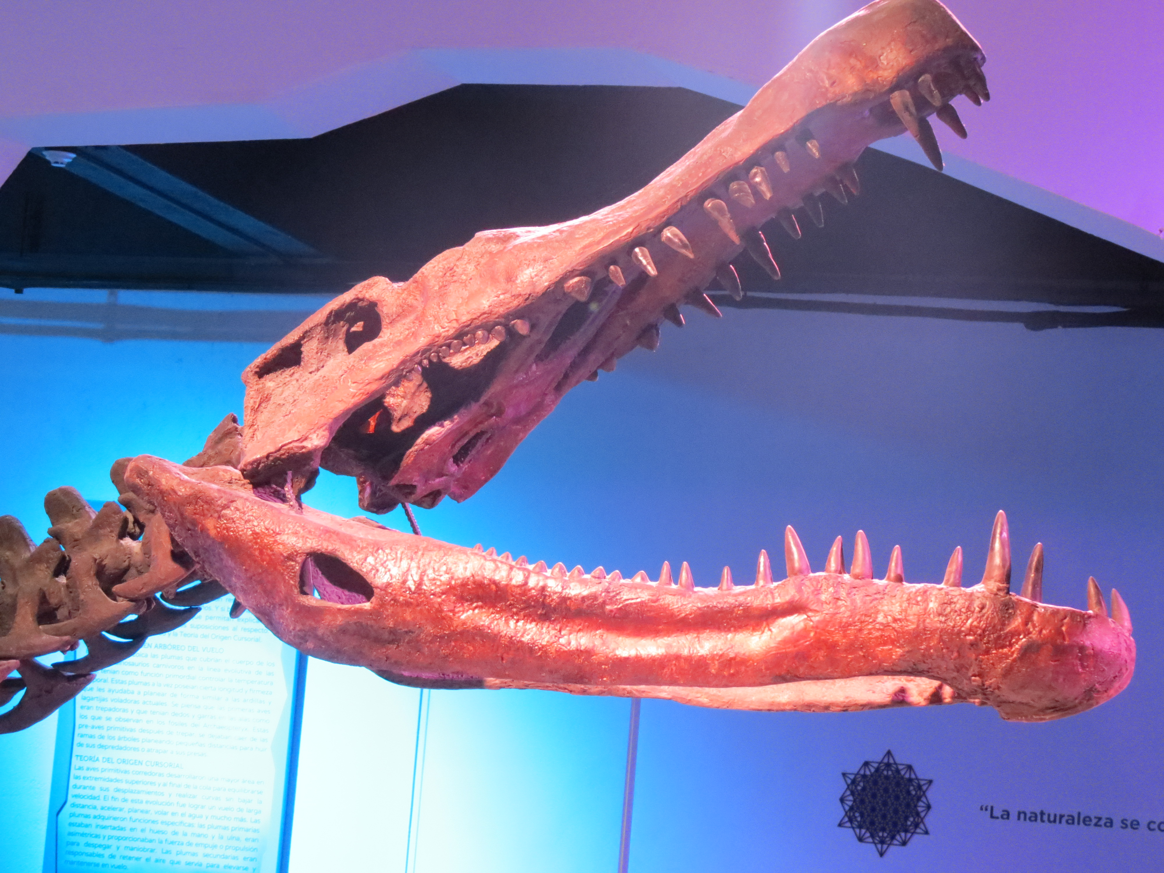 Cráneo de Deinosuchus Riograndensis en el Museo de la Evolución de Puebla